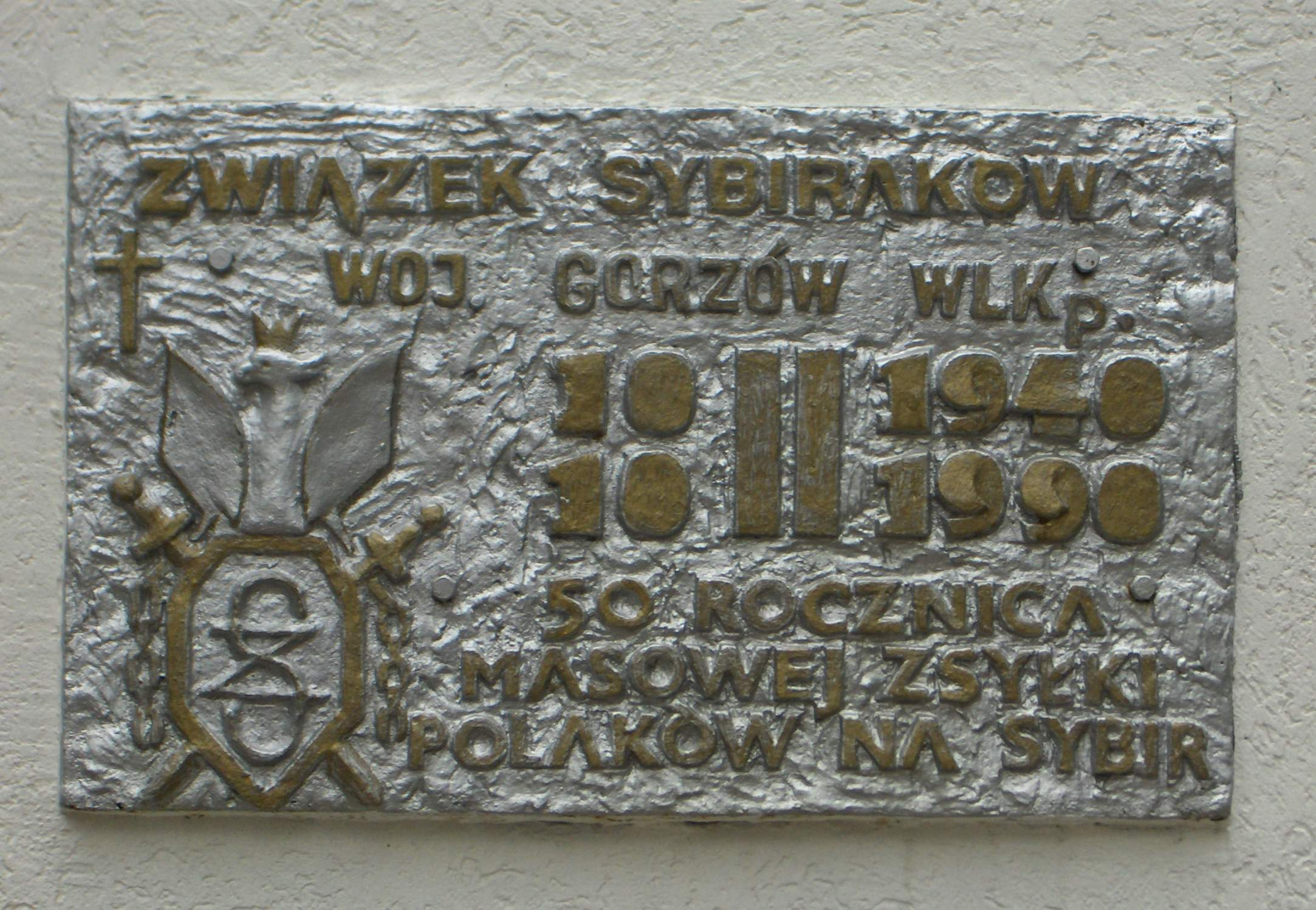 Polski Pomnik Sybiraków w Słubicach #2